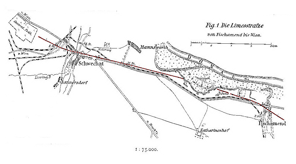 Die Limesstraße zwischen Fischamend und Wien